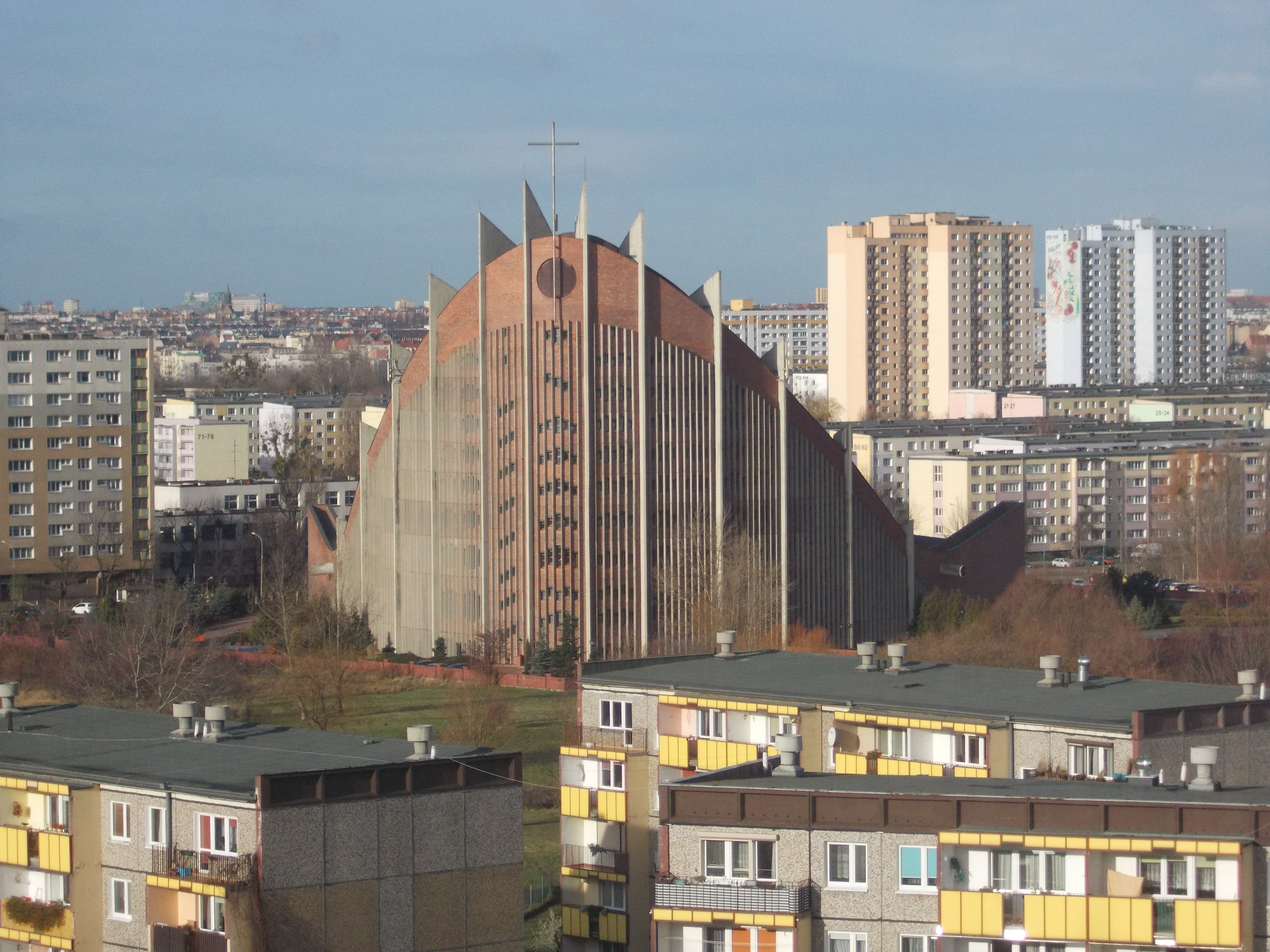 Widok kościoła parafii NNMP, osiedla Polan i Rzeczypospolitej.